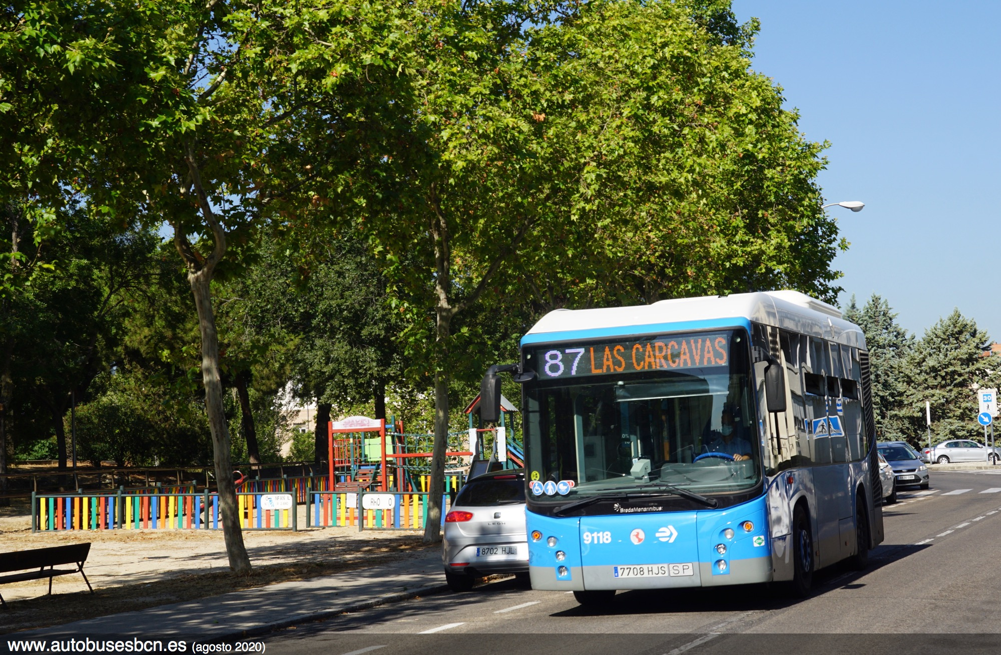 87 EMT Madrid en Hortaleza, en la Av. Bucaramanga, agosto 2020